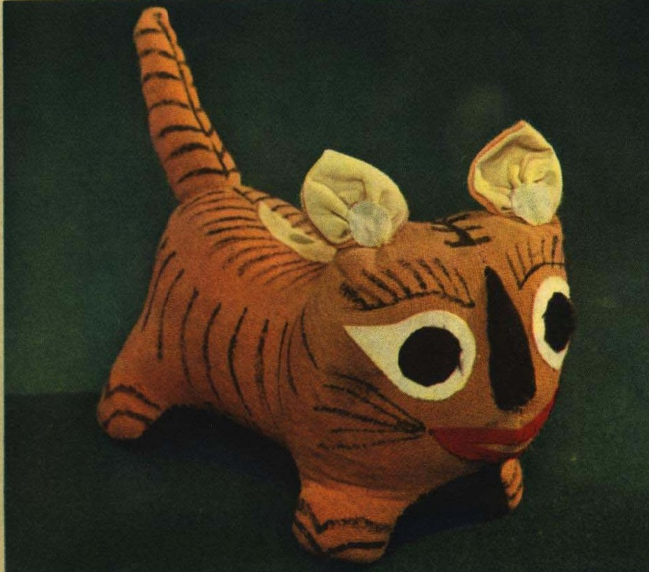 1962-01 1962年 布老虎